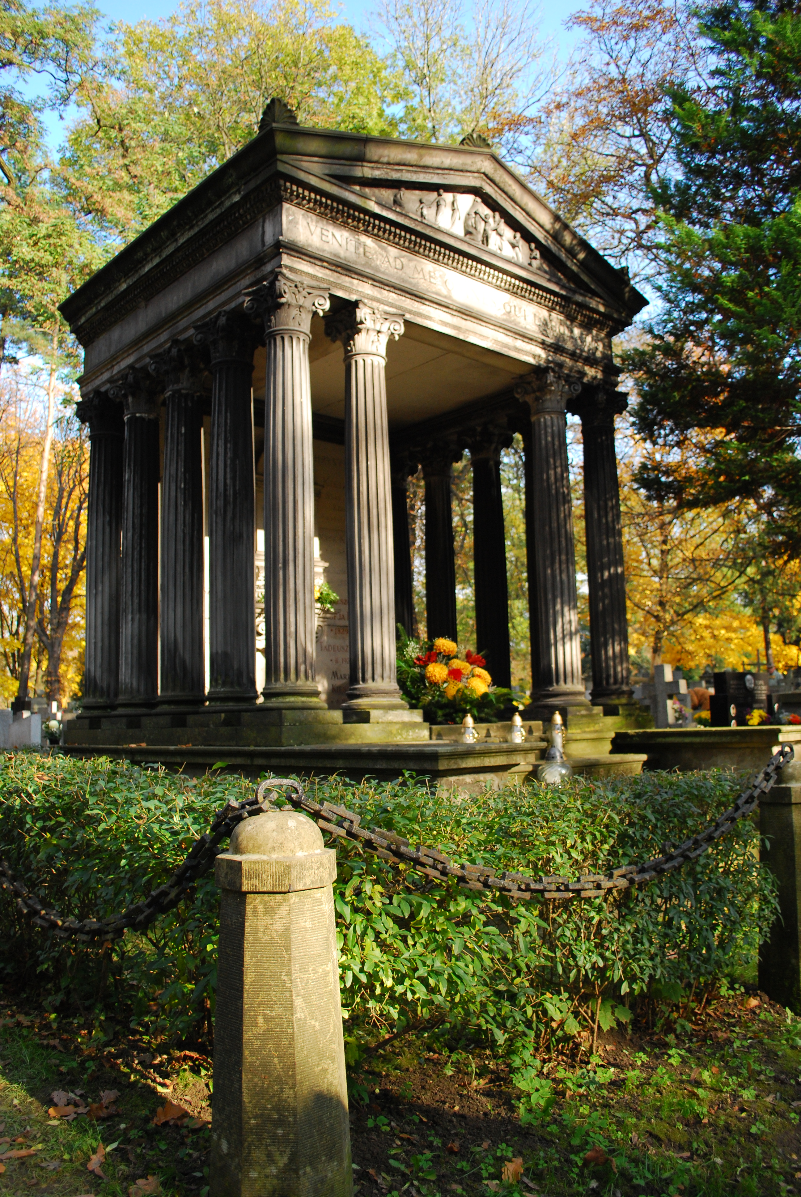 Cmentarz Rakowicki w Krakowie